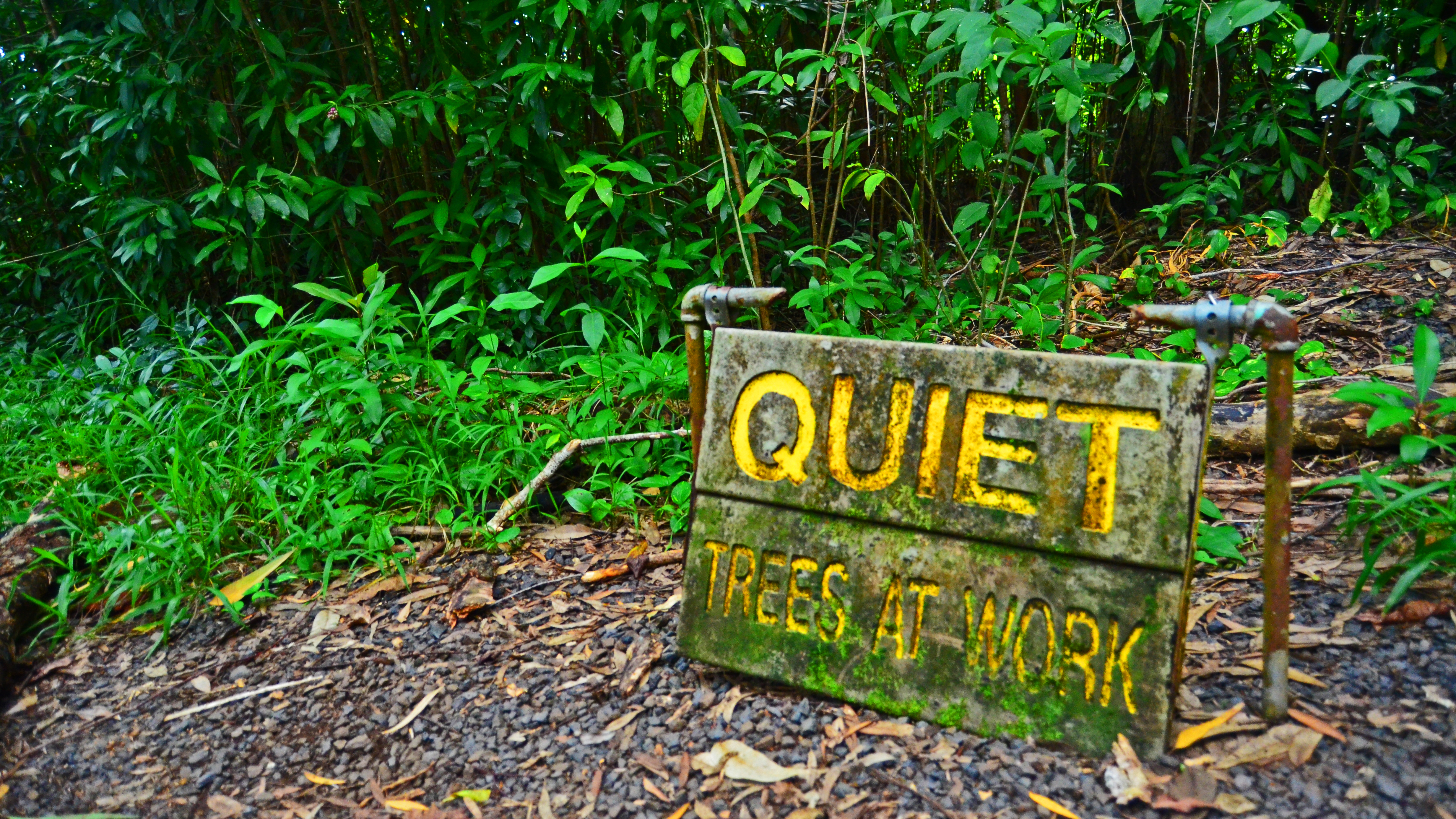 Kaumahina State Wayside, Haiku-Pauwela, Hawaii